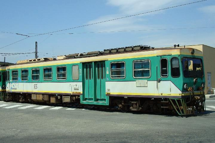 Dieselelektrischer Triebwagen Serie ADe 91-98 der Ferrovie della Sardegna (FdS) auf einer Strassenüberquerung zwischen Monserrato via San Gottardo und Monserrato (Gemeinde Monserrato, Provinz Cagliari, Italien), Anfangs September 2008.